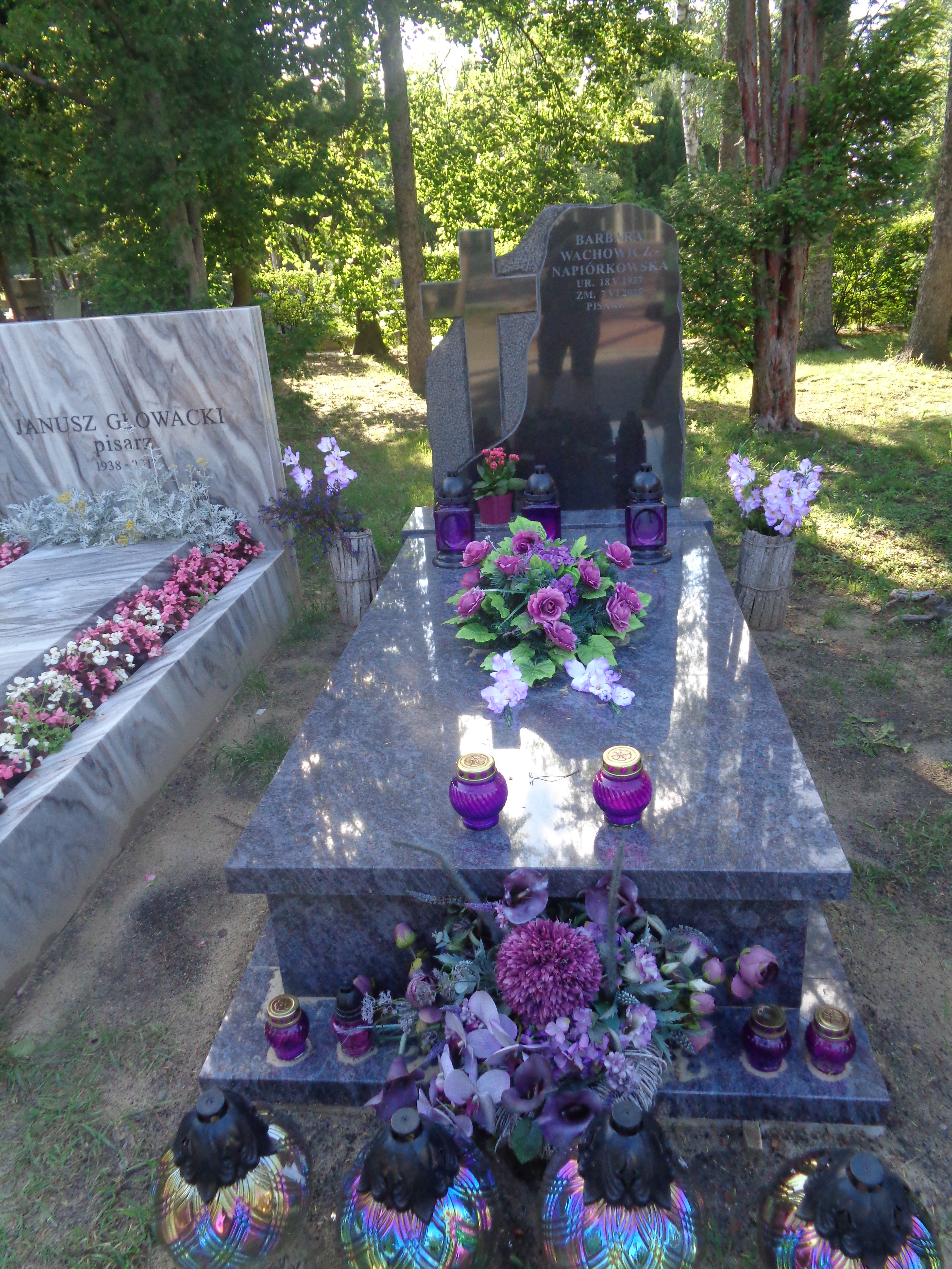 Grób pisarki Barbary Wachowicz-Napiórkowskiej na Cmentarzu Wojskowym na Powązkach w Warszawie